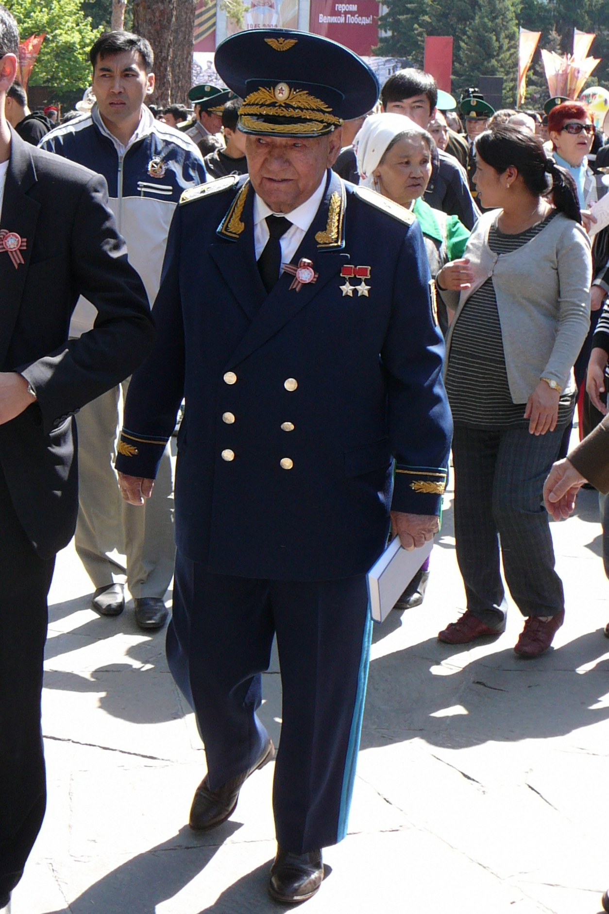 Талгат Якубекович Бегельдинов. Генерал-майор авиации, Дважды Герой Советского Союза. 9 мая 2009-го. Алматы